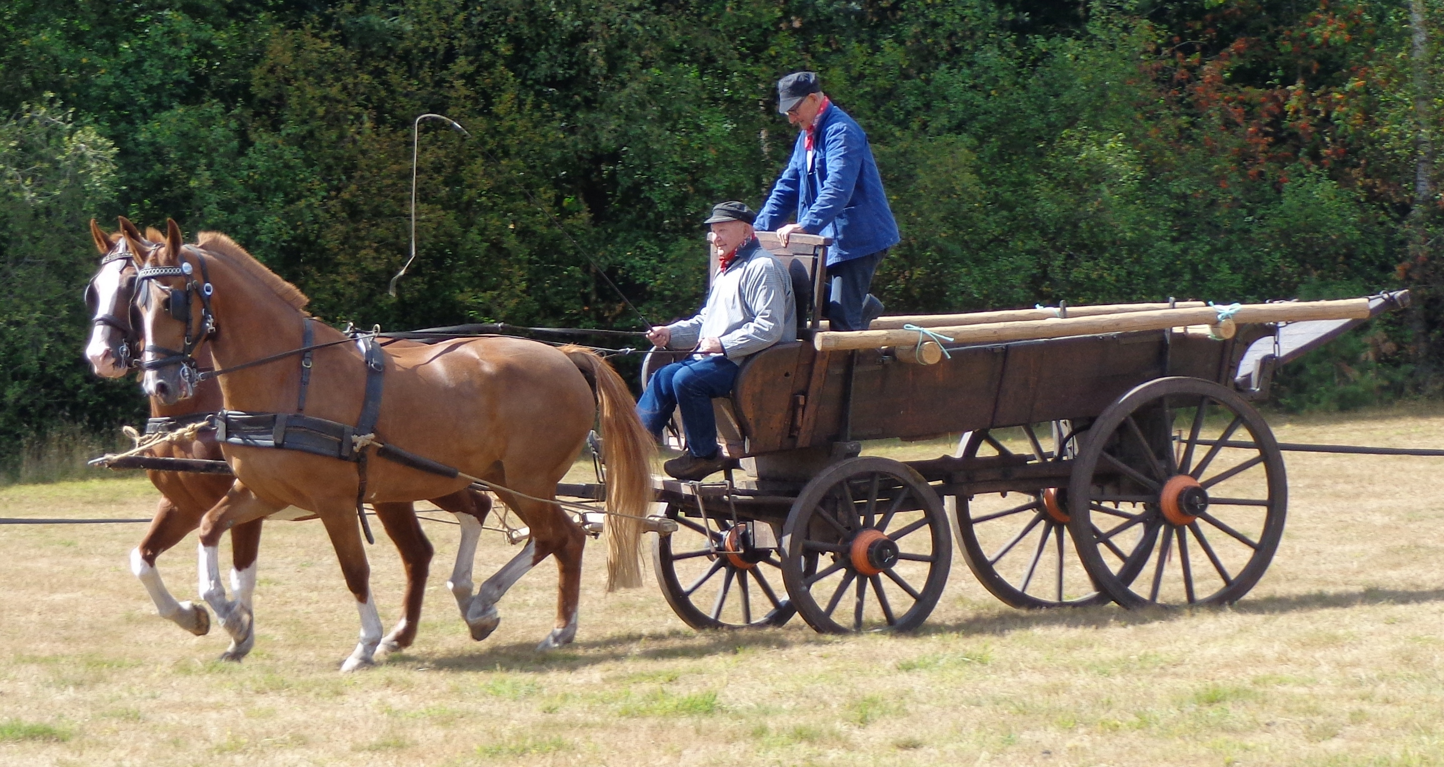 Boerenwagen, Gelders of Utrechts model, op de 24e Oogstdag in De Treek (Leusden)